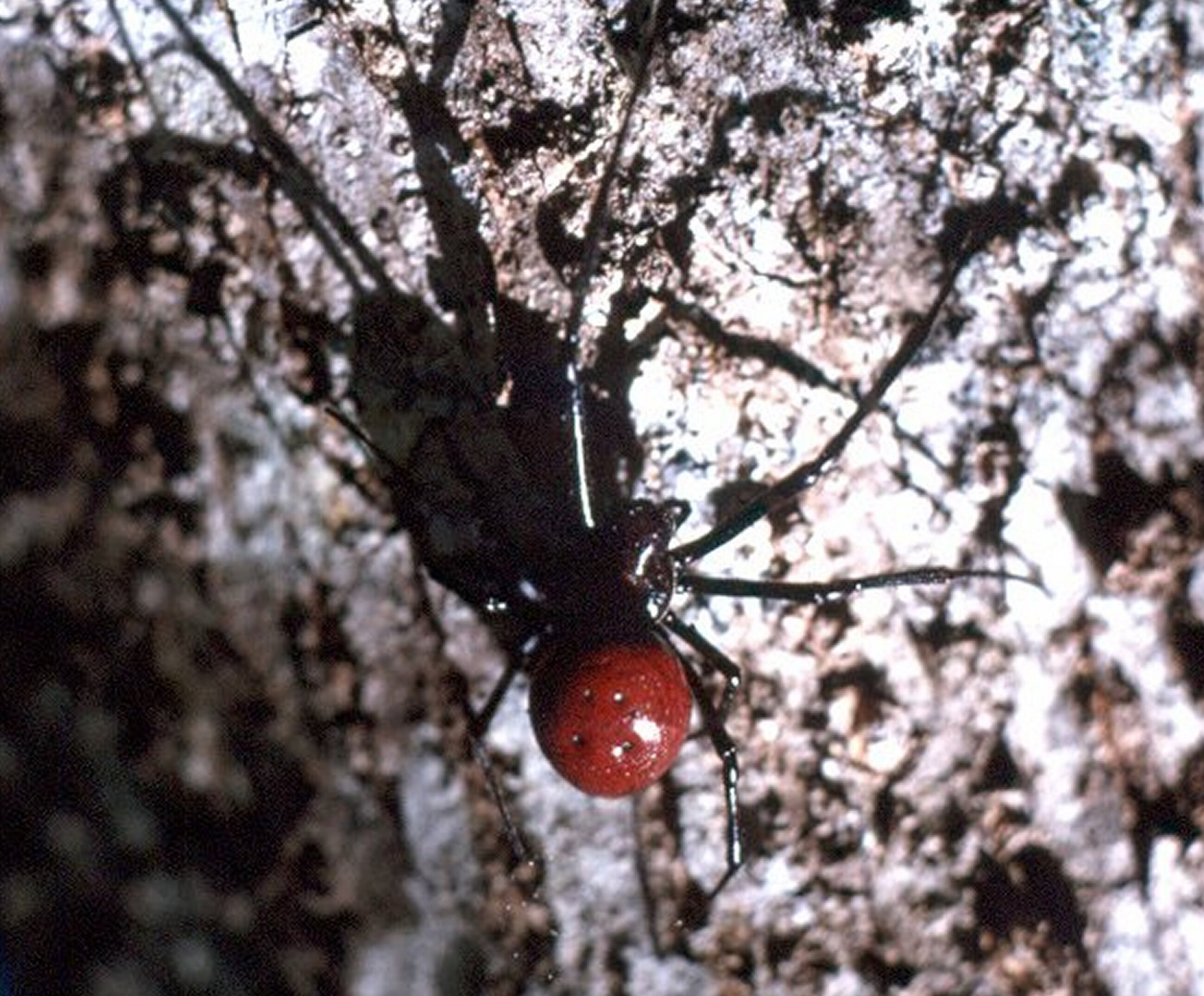 Nephilengis borbonica, femelle adulte,vue dorsale.Sur un tronc d'arbre, forêt du Grand Matarum, Cilaos, île de la Réunion.